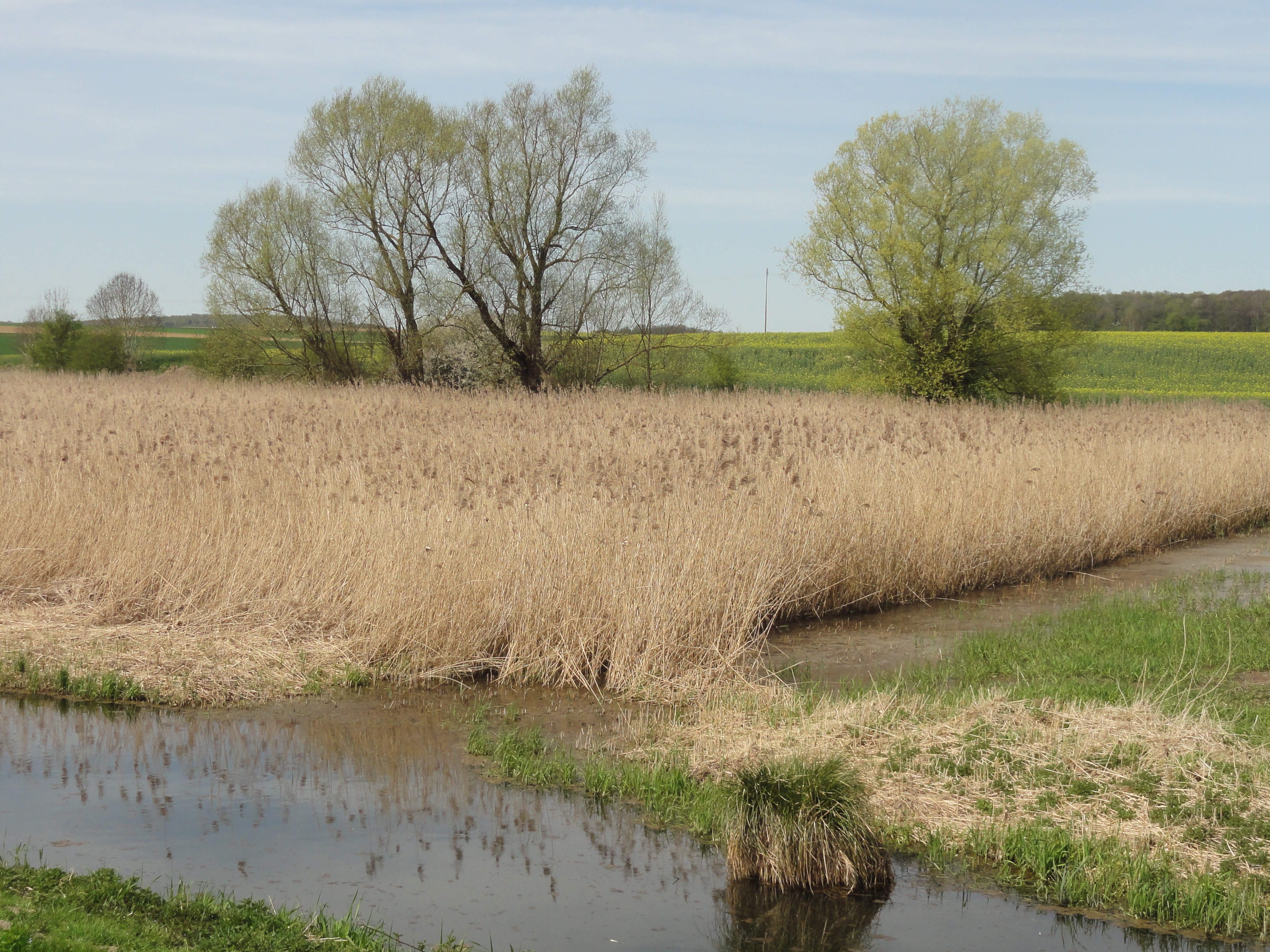 Village d'Auger-Saint-Vincent (voir titre).